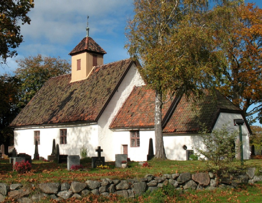 Gamle Glemmen kirke og en del av kirkegården sett fra sørøst